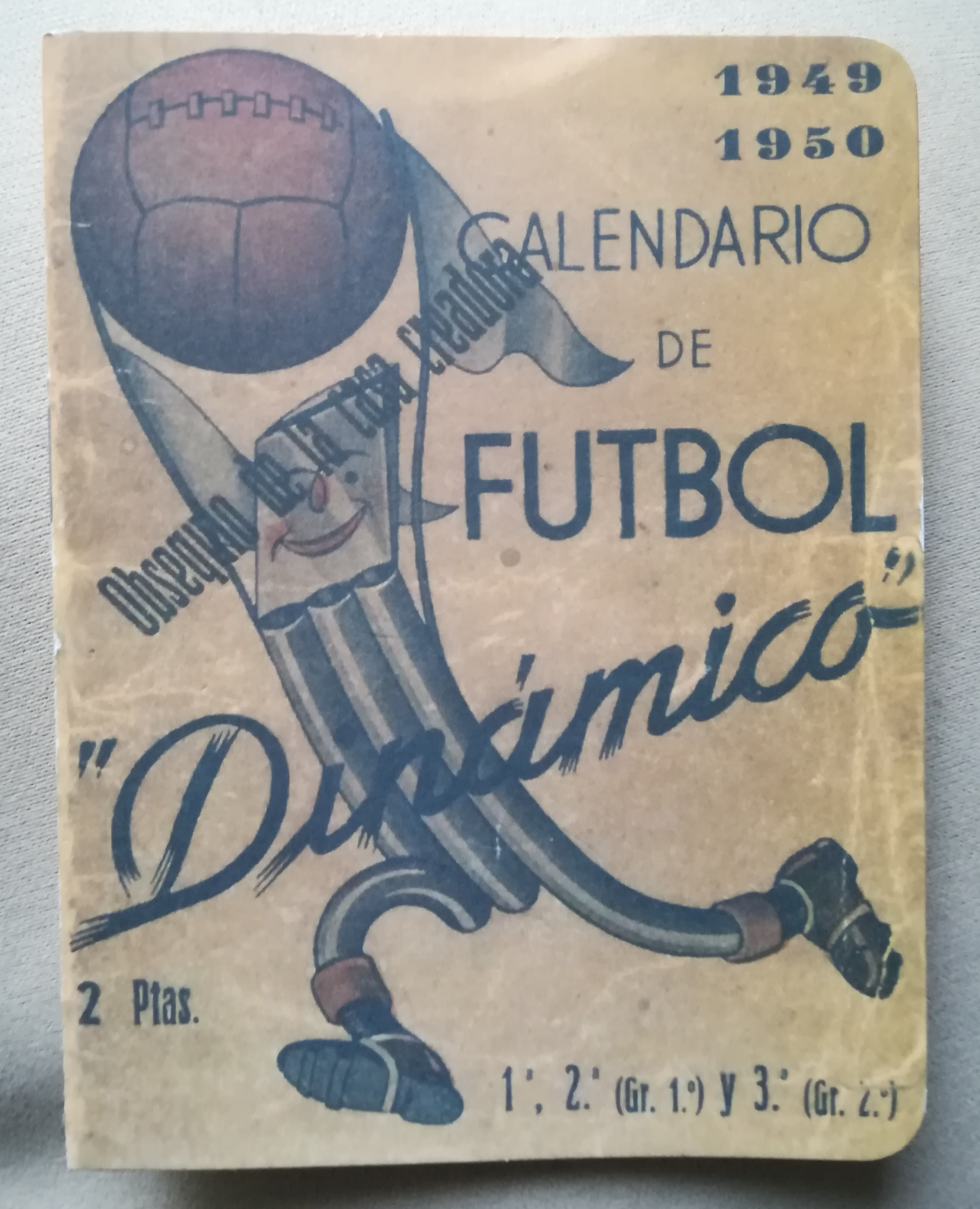 Primer "Calendario Dinámico" de la temporada de fútbol español, 1949-50